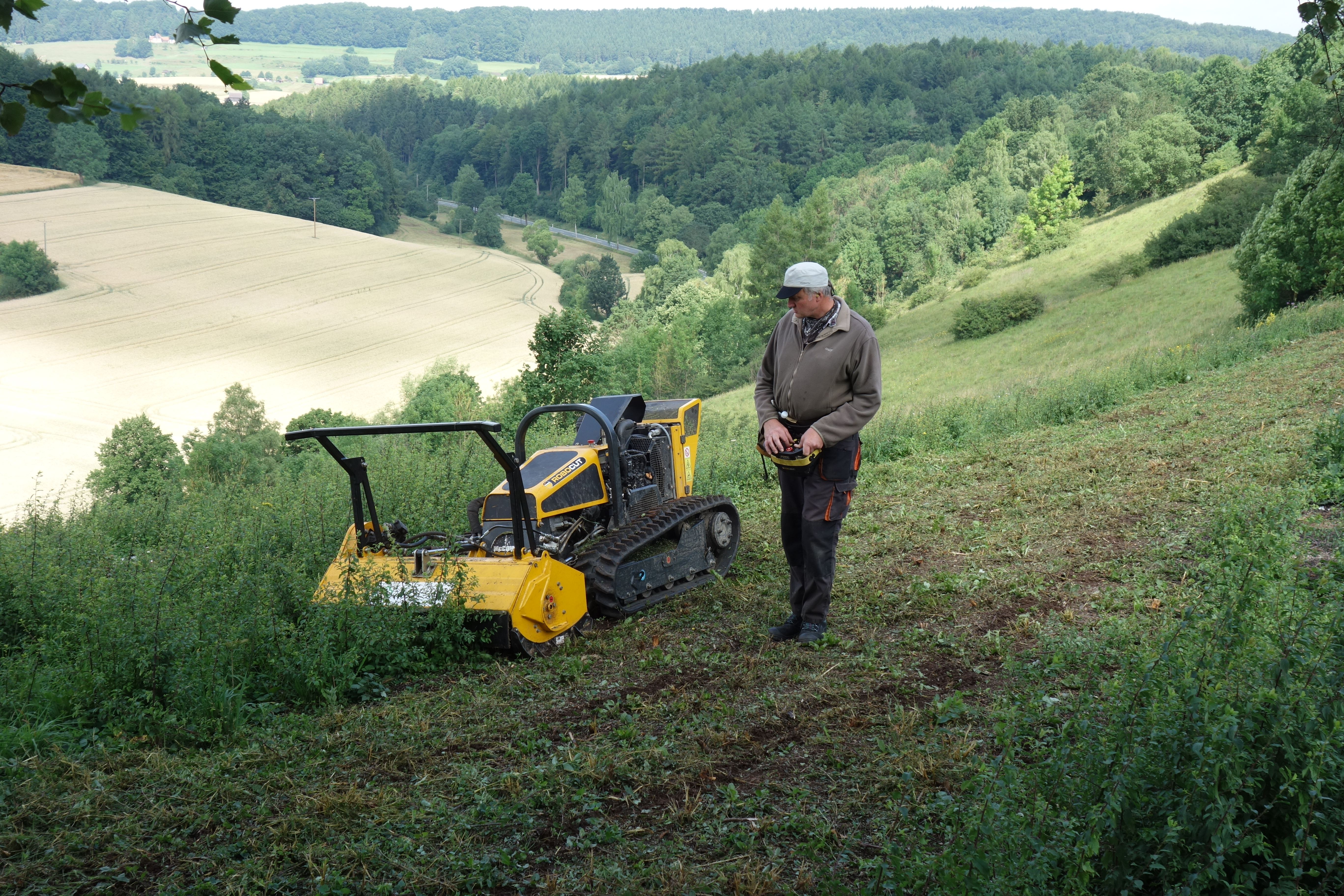 Mulchen eines im Winter von Schwarzdornbüschen entbuschten Bereichs im Naturschutzgebiet Halbtrockenrasen am Dahlberg mit einem Robocut durch einen Mitarbeiter der Biologischen Station Hochsauerlandkreis.